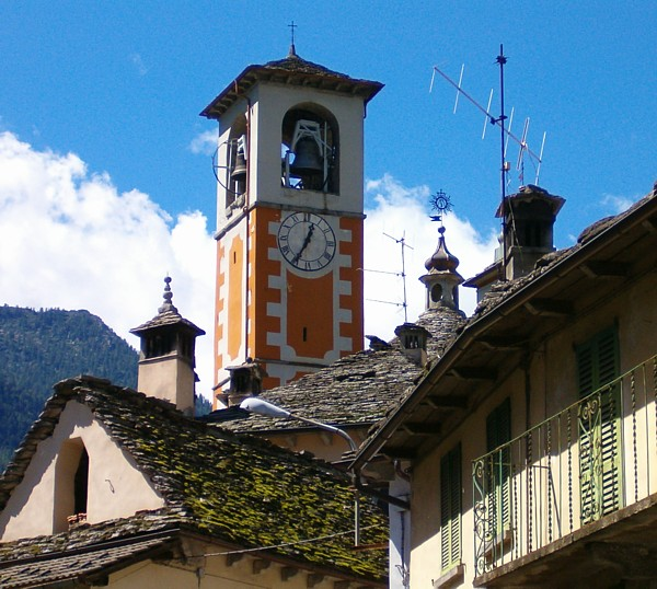 Dorp in Valle Anzasca